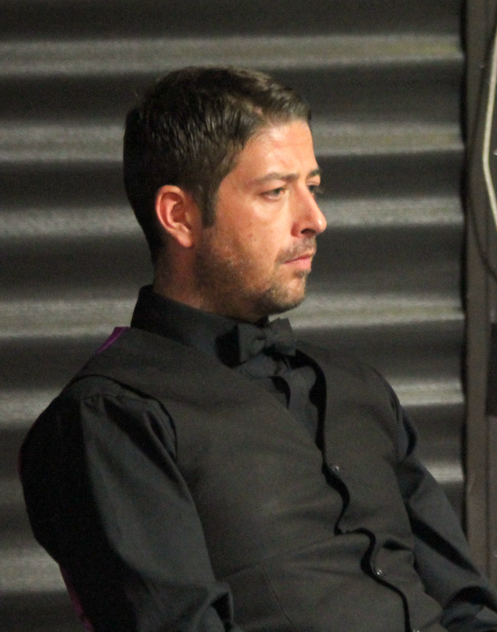 Matthew Stevens beim Paul Hunter Classic 2016